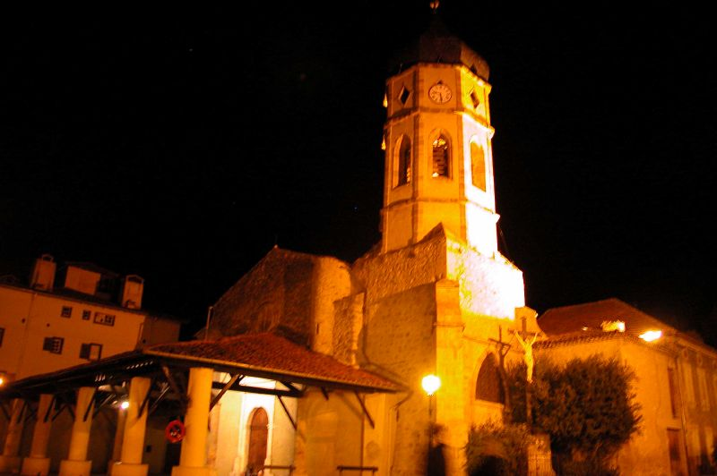 Village du Mas d'Azil la nuit (Ariège, France).